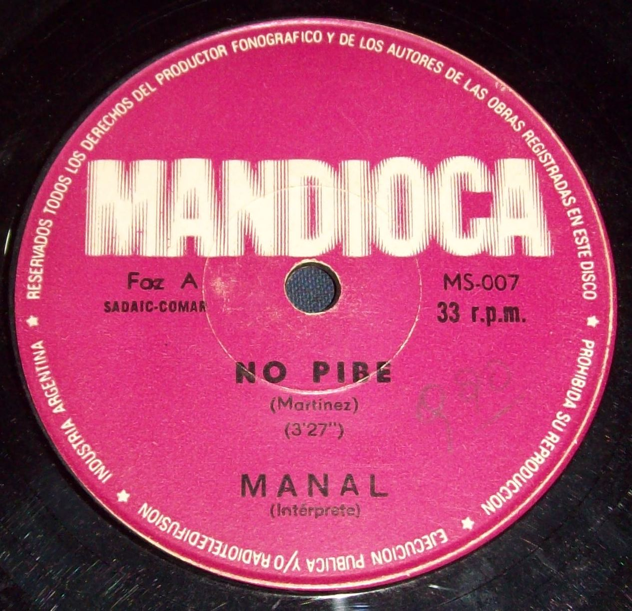 Sencillo No Pibe / Necesito un Amor de Manal.